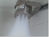 Condensed aerosol fire suppression, Stat-x electrical nozzle